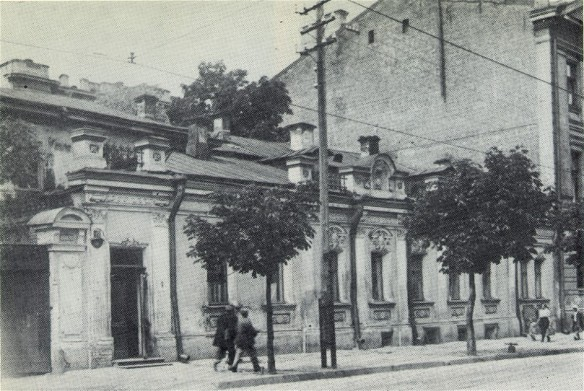 Школа ім. Лисенка (Київ, Велика Підвальна, 15)